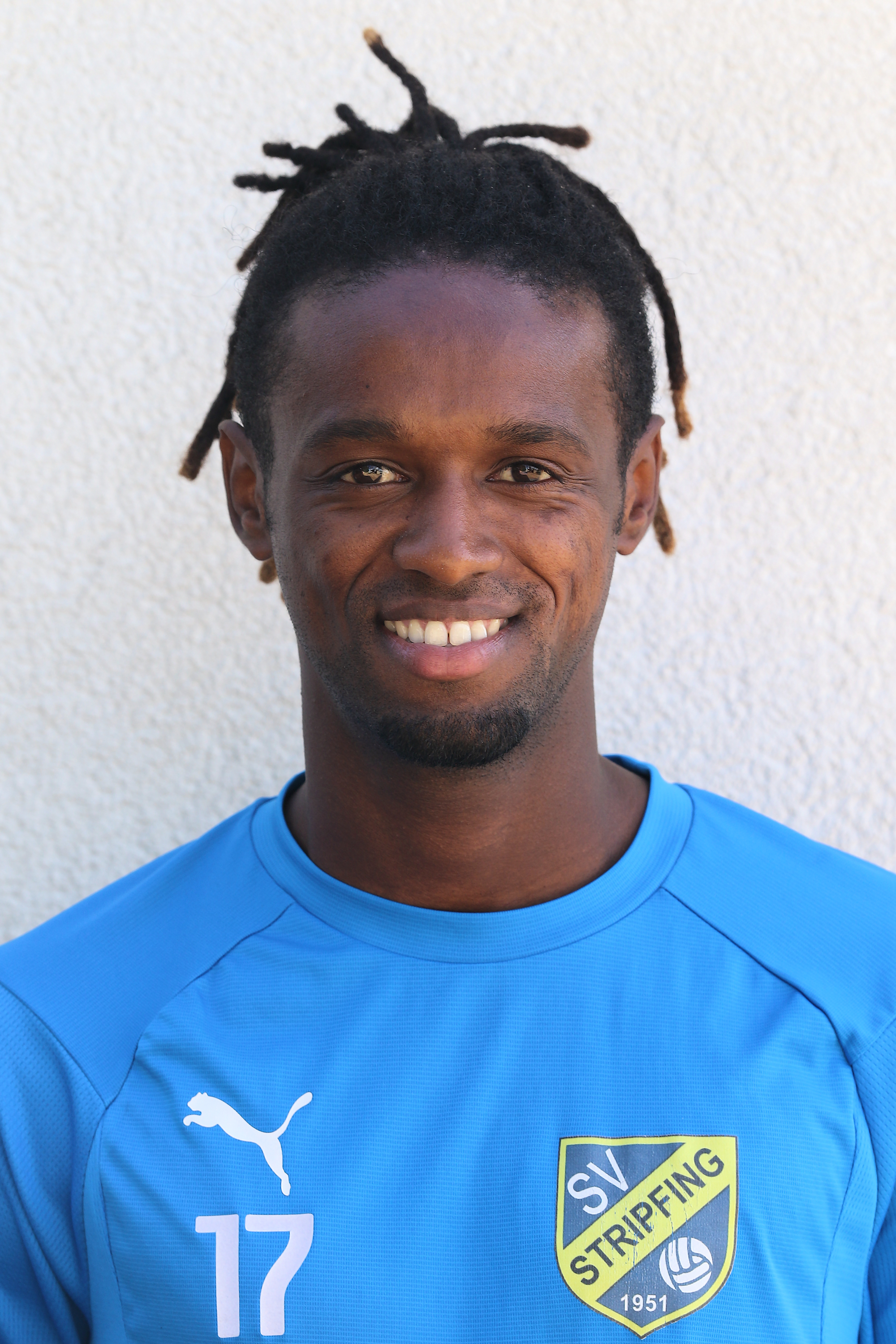 Meisterschaftsspiel der Regionalliga Ost 2019/20 SC Wiener Neustdat (weiße Trikots) gegen SV Stripfing (gelbe Trikots) am 17. August 2019 1:1 (1:0). – Das Bild zeigt Flavio dos Santos Dias (SV Stripfing).